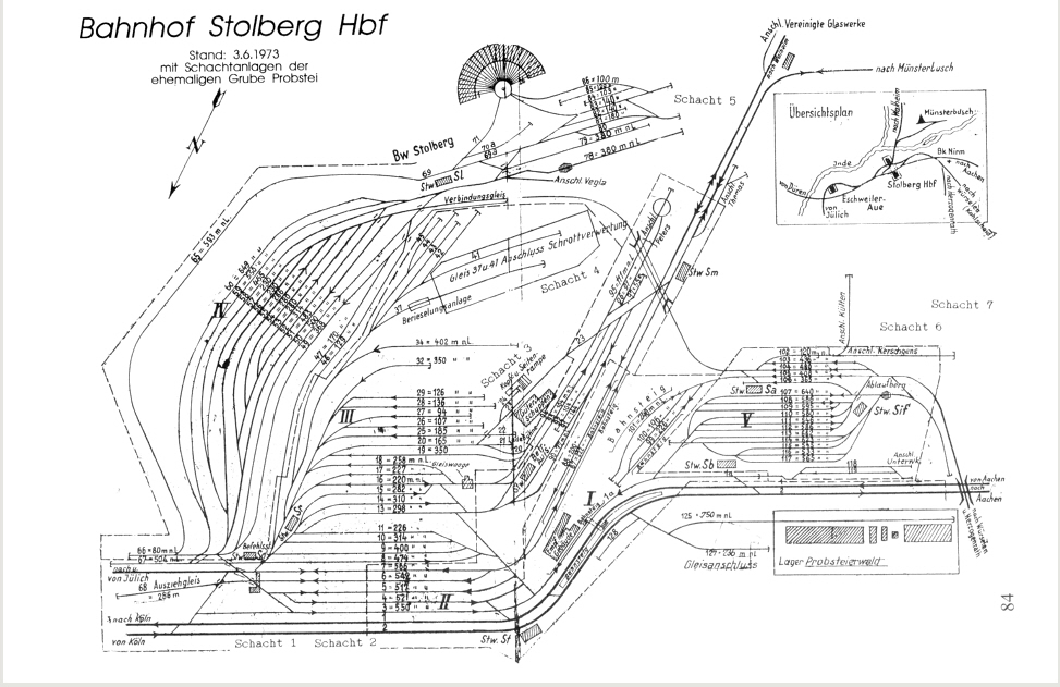 Gleisplan Bahnhof Stolberg 1973